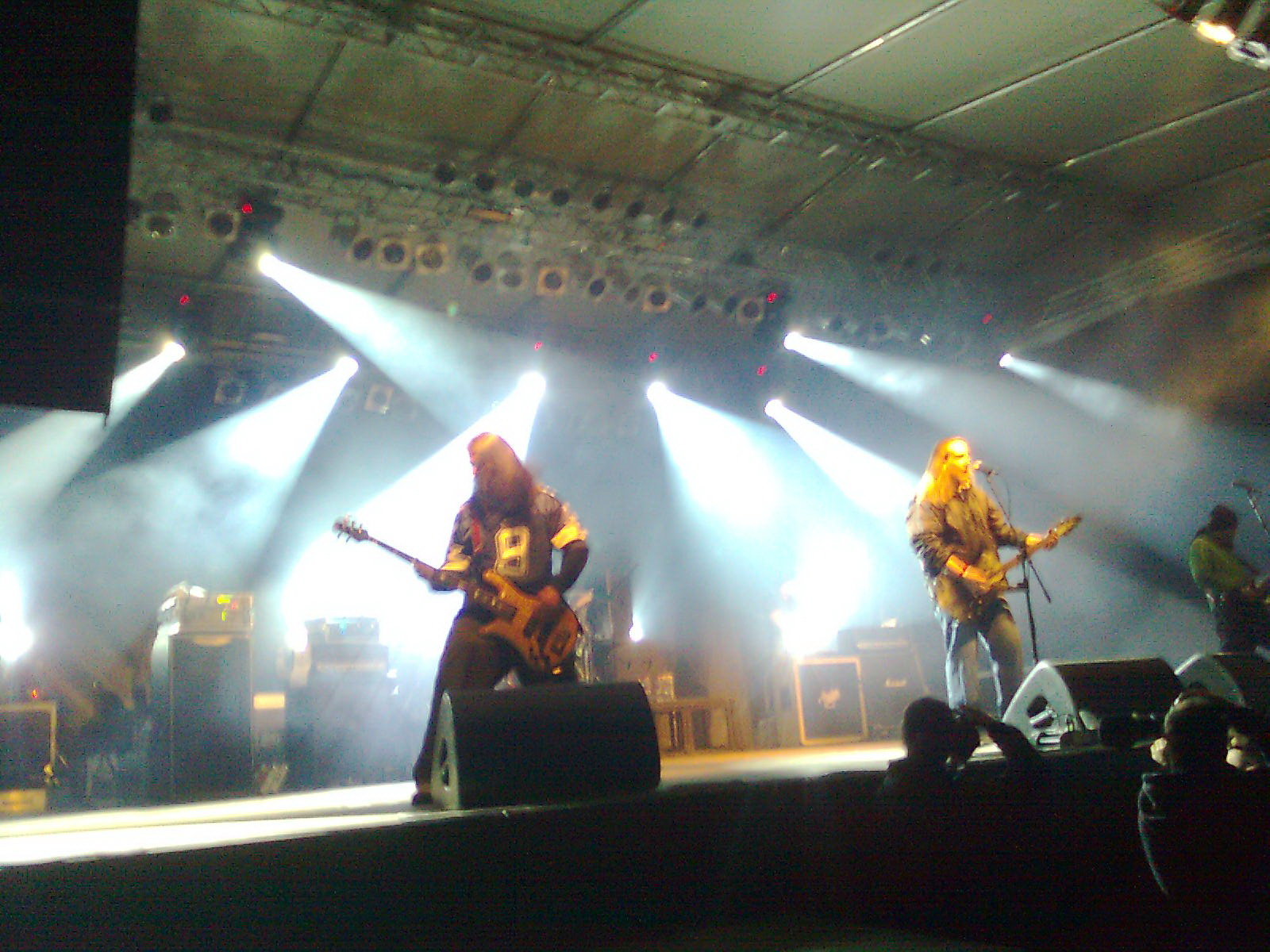 Depresszió live at a concert.